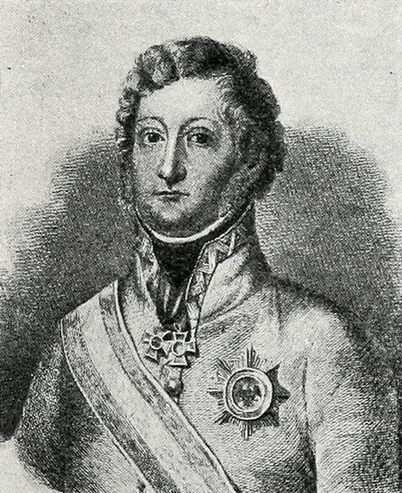 Иероним фон Коллоредо-Мансфельд (30 марта 1775—23 июля 1822) — австрийский генерал и георгиевский кавалер. Эта фотография была использована для иллюстрирования статьи «Коллоредо, графы» опубликованной в тринадцатом томе «Военной энциклопедии», который был издан книгоиздательским товариществом И. Д. Сытина в 1913 году в столице Российской империи городе Санкт-Петербурге. Более подробное описание к этой картинке можно прочесть в указанной выше статье.